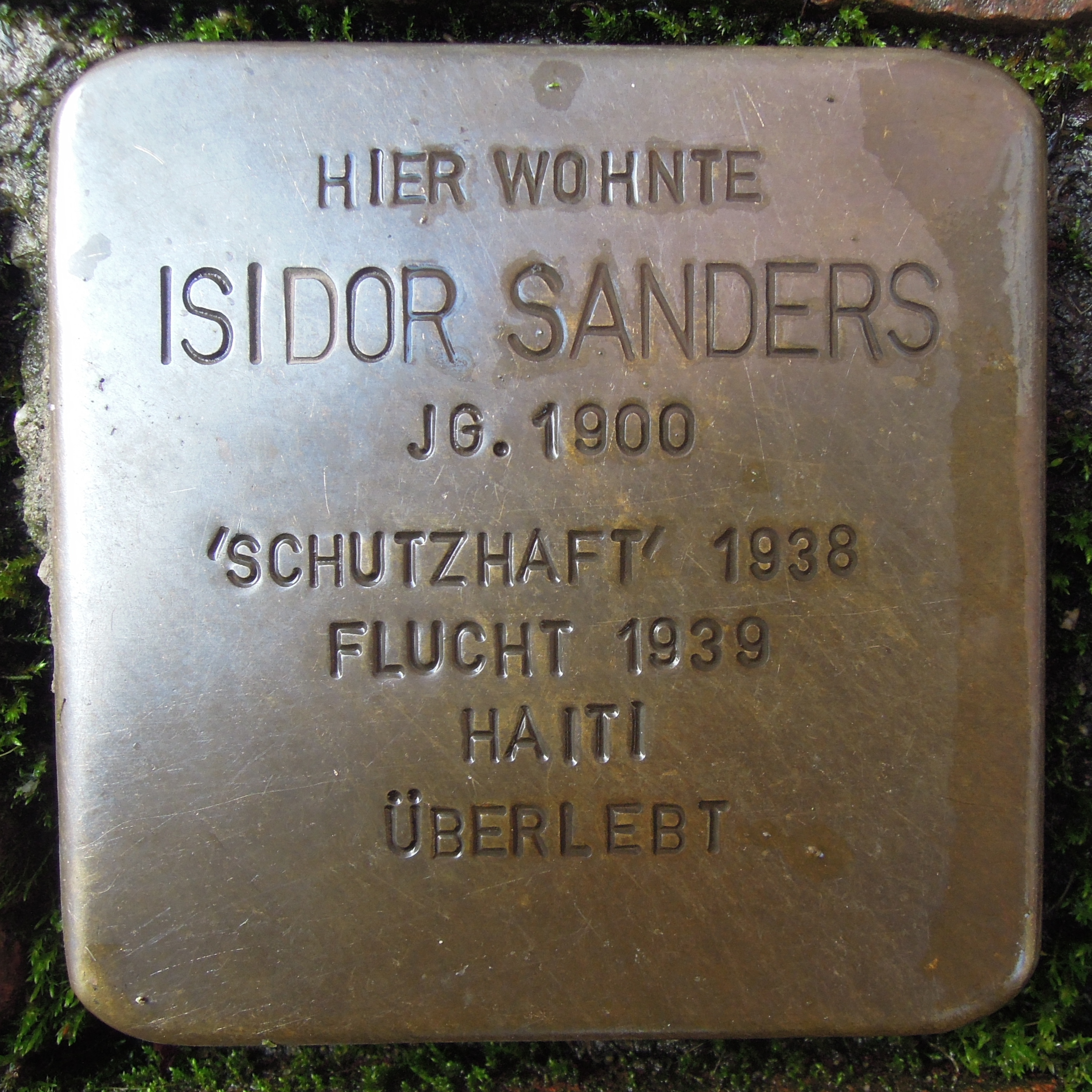 Stolperstein in Straelen, Mühlenstraße 10 für Isidor Sanders